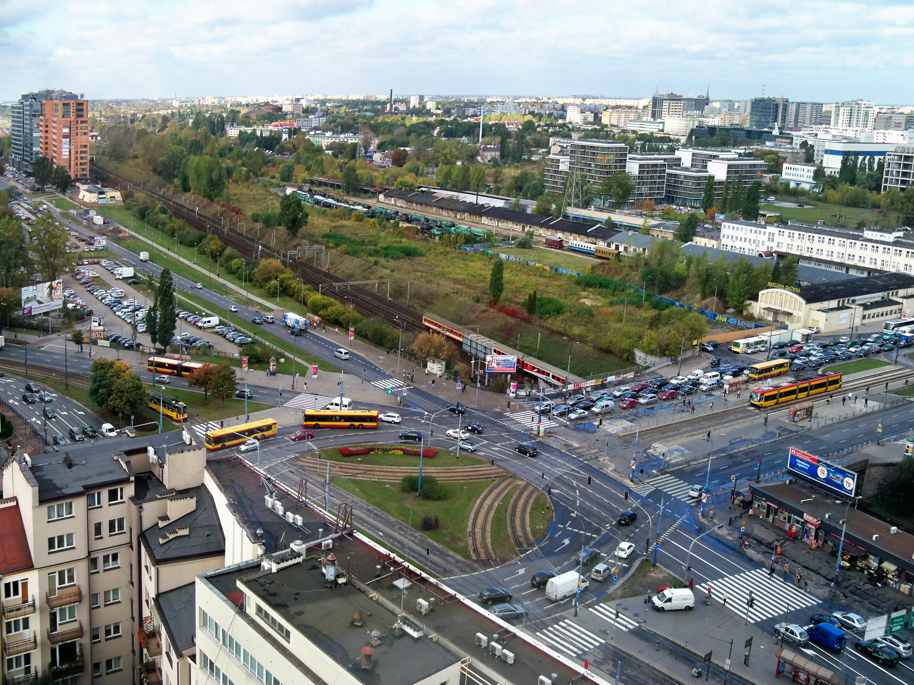 Widok z Millenium Plazy w Warszawie.